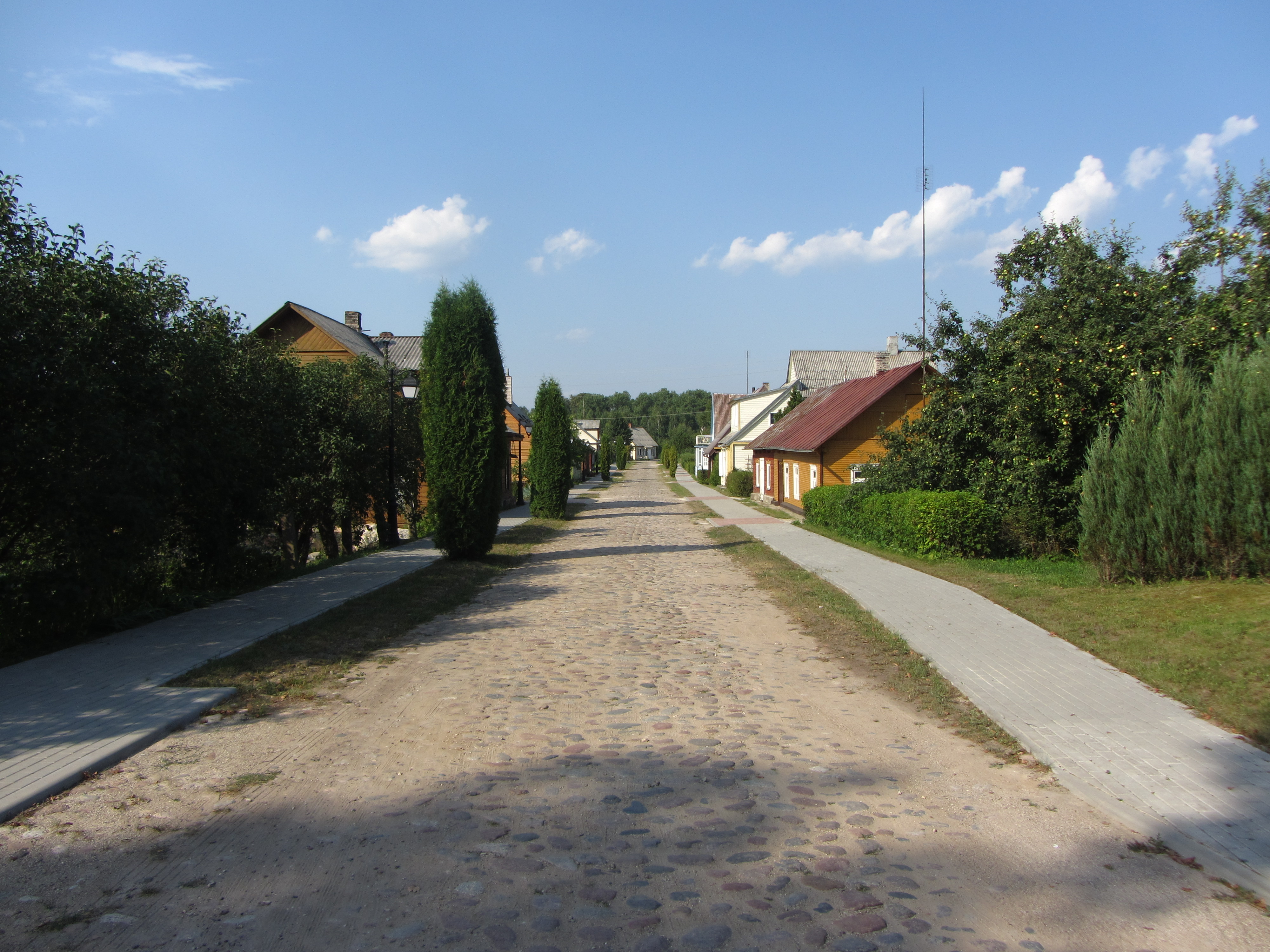 Saldutiškis, Lithuania